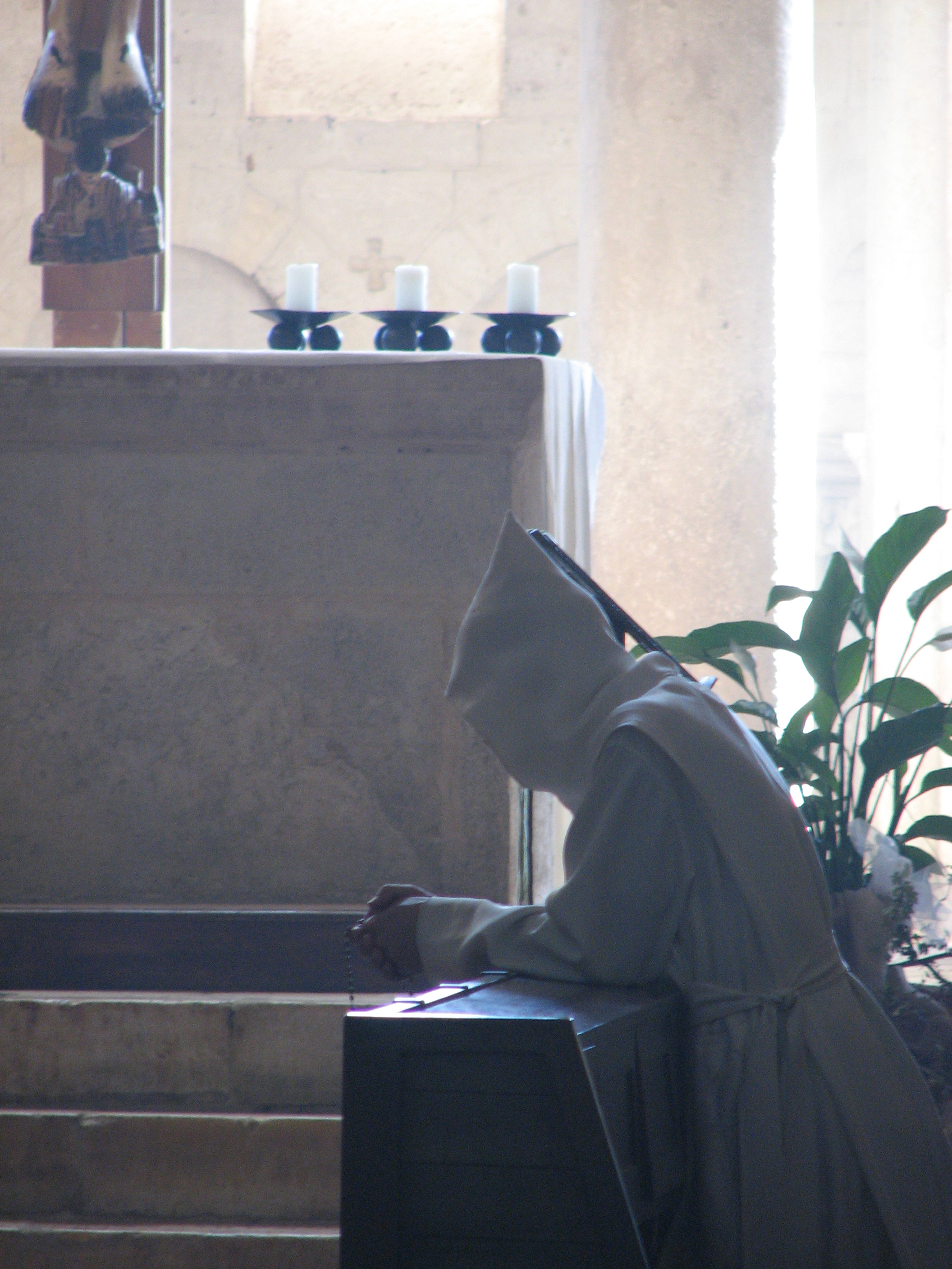 L'Abbazia di Sant'Antimo (Montalcino, Toscana, Italy) - Canonico regolare in preghiera